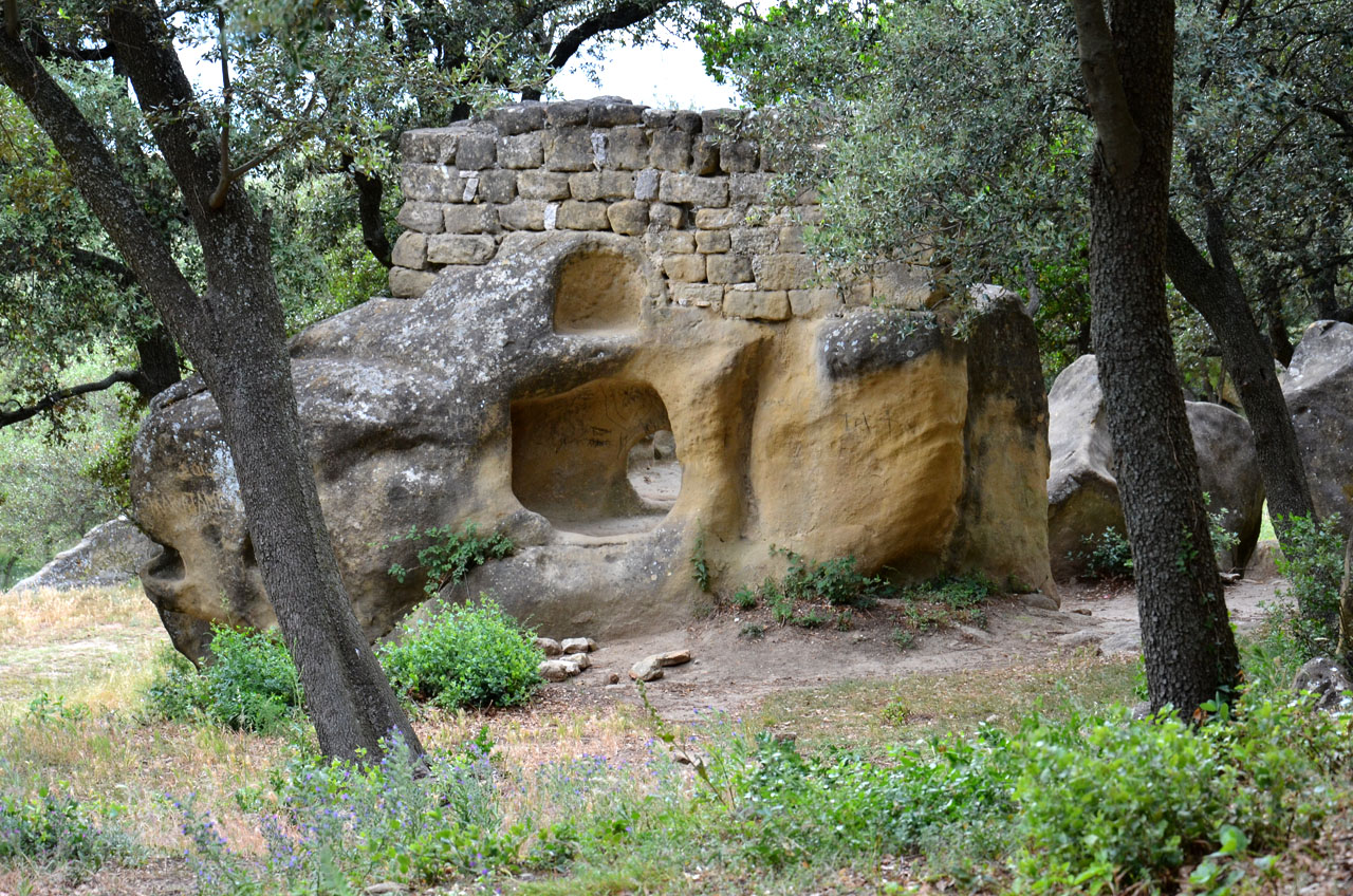 Höhlen von Calès in Lamanon